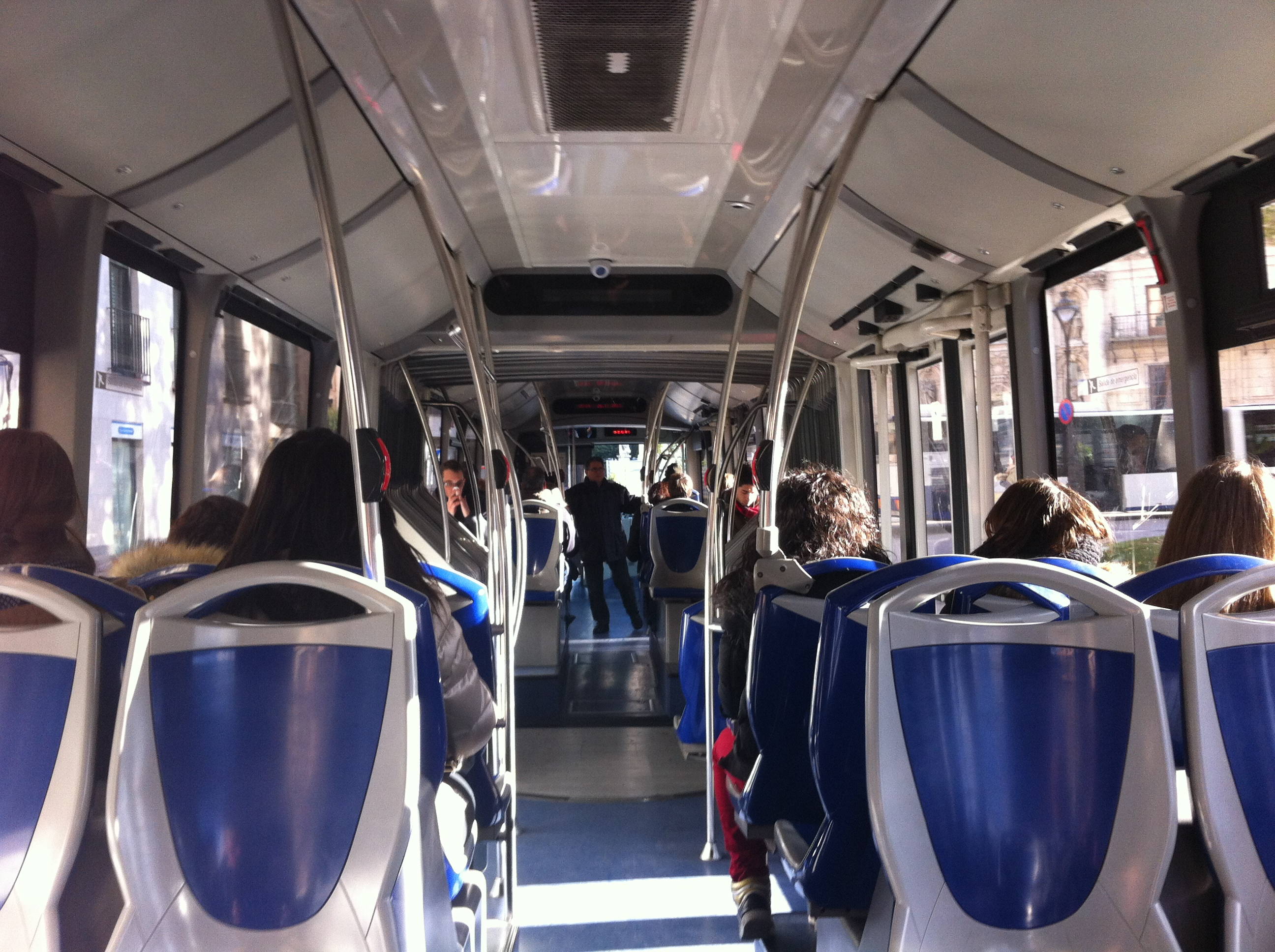 Interior de un autobús urbano en la ciudad de Valladolid (año 2013)